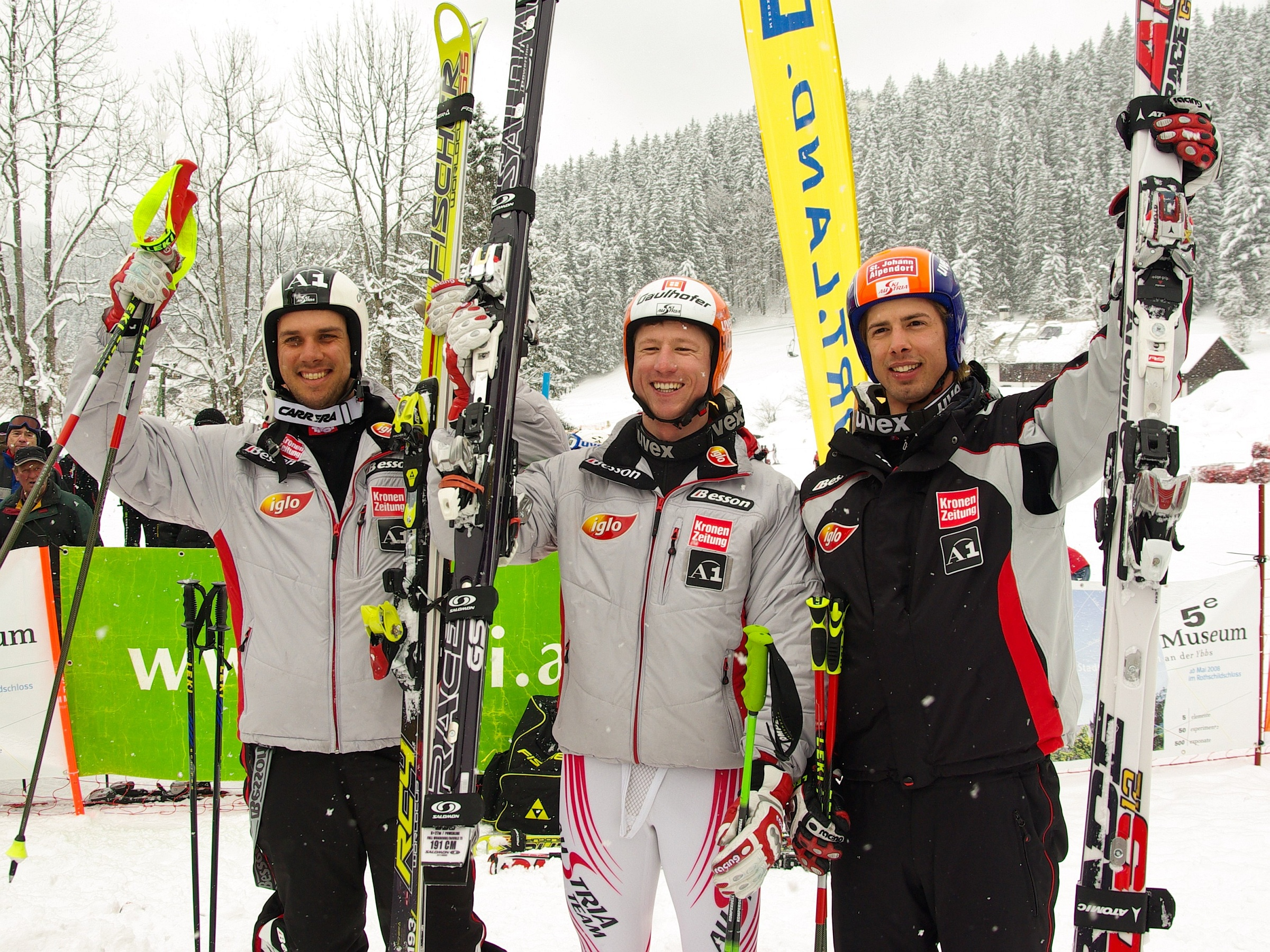 Die Sieger des Riesenslaloms der Österreichischen Alpinen Skimeisterschaften 2009: 1. Platz: Hannes Reichelt (mitte), 2. Platz: Mario Matt (links), 3. Platz: Joachim Puchner (rechts)